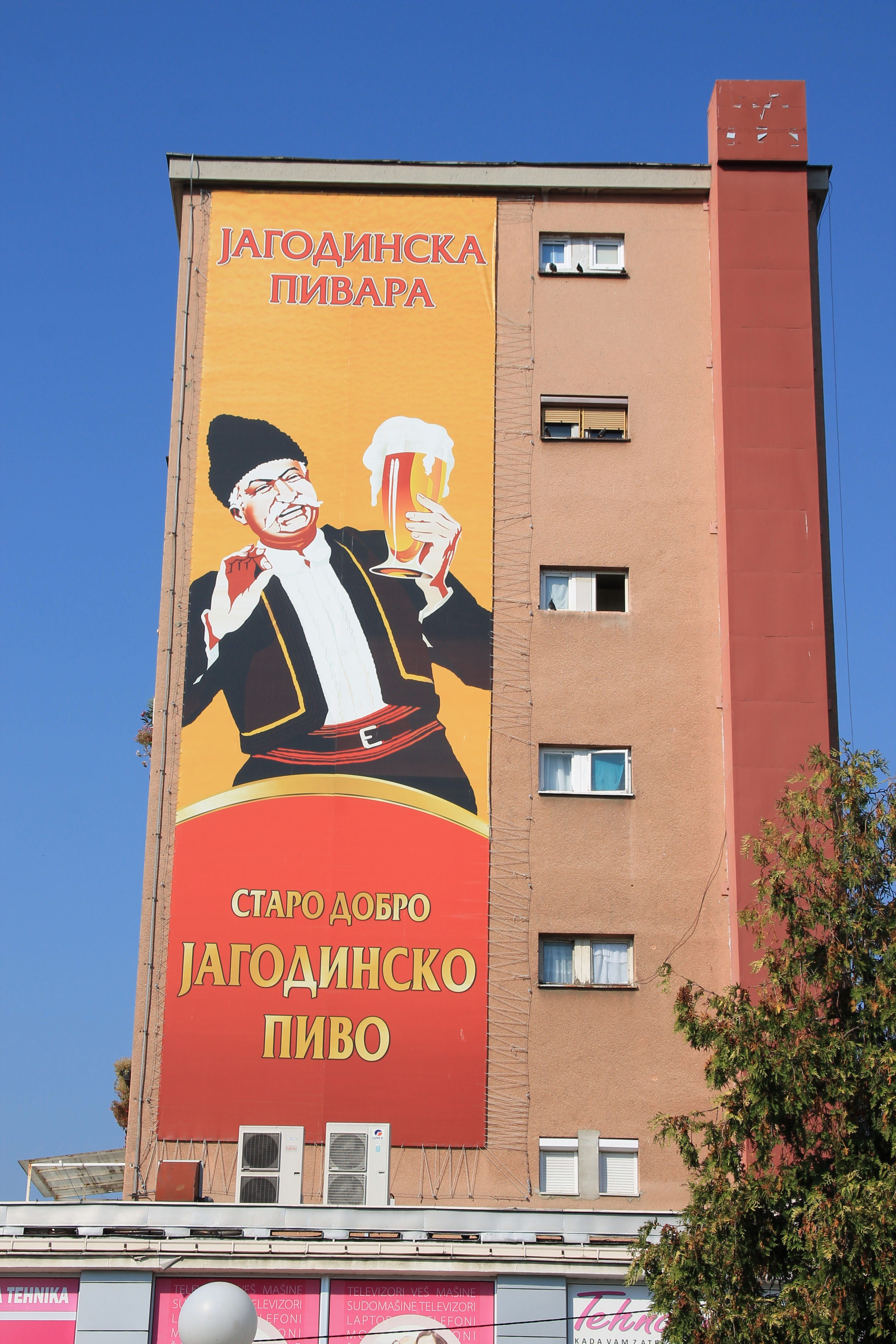 Buildings in Jagodina